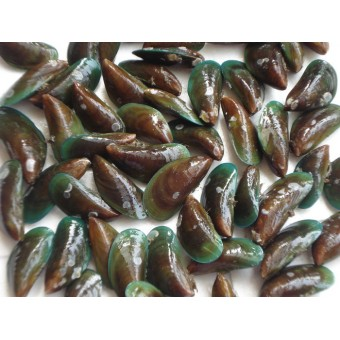 Kerang Hijau